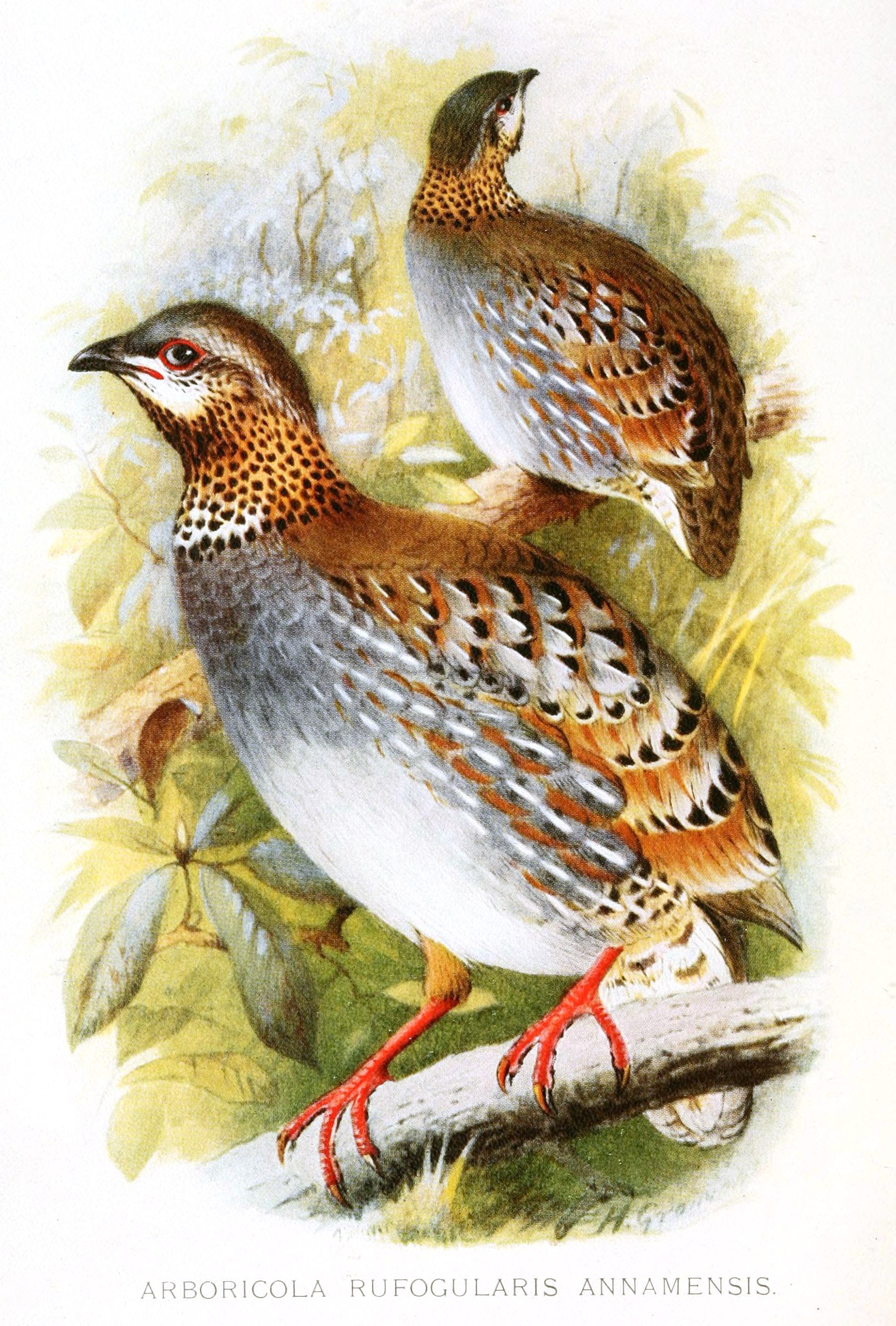 Arboricola rufogularis annamensis